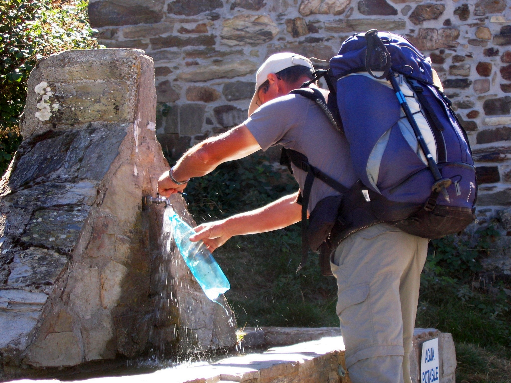 Bildbeschreibung: Neuzeitlicher Pilger am spanischen Jakobsweg beim Nachfüllen der Wasservorräte / Pilgrim in Spain during refill of water Quelle: selbst fotografiert / shot by myself Fotograf/Zeichner: Dietmar Giljohann Datum: September 2005 Sonstiges: GNU-FDL